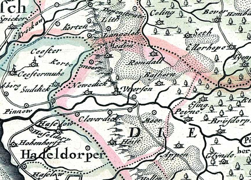 Uetersen und Umgebung, Ausschnitt aus der "Landtcarte des Fürstenthumbe Stormarn" von Johannes Mejer (* 1606 Husum; † 1674 Husum) aus dem Jahr 1650